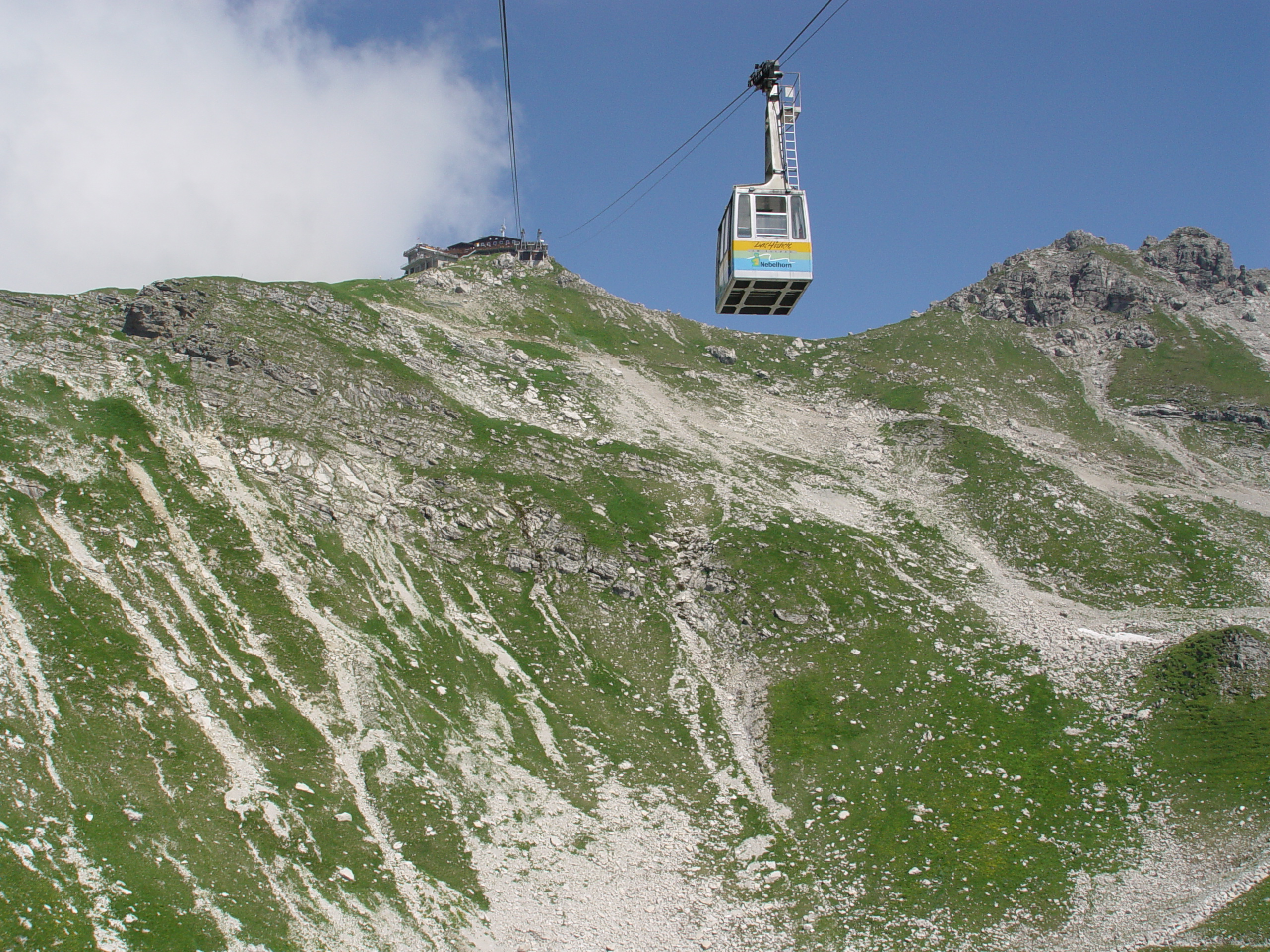 Blick auf das Nebelhorn von der Nebelhornbahn aus